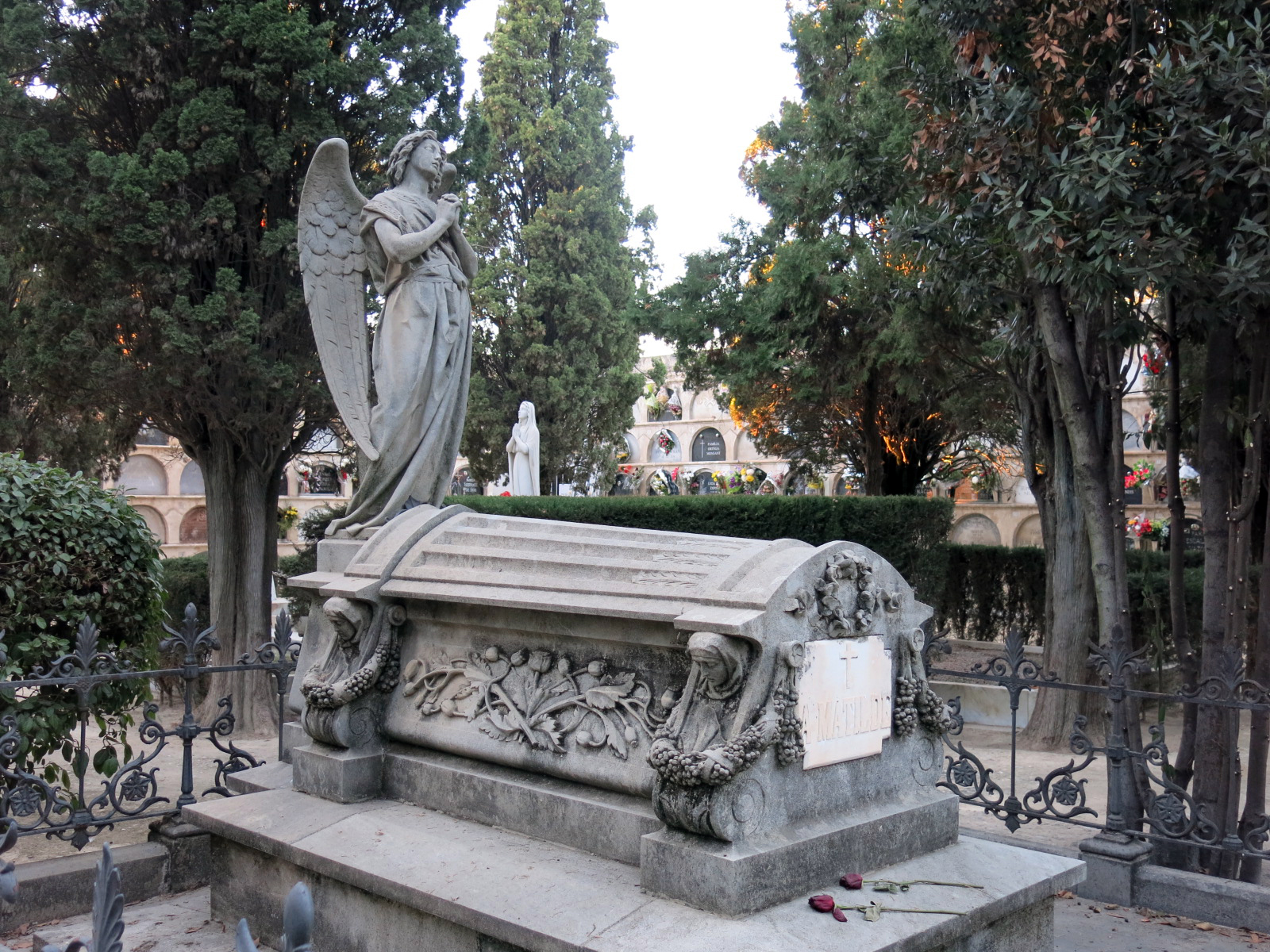 Cementiri municipal de Vilafranca del Penedès